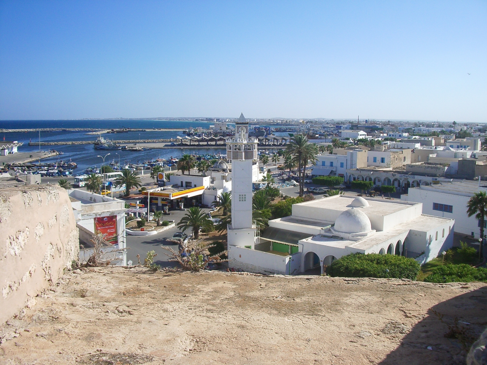 Mahdia des de la Torre Obscura